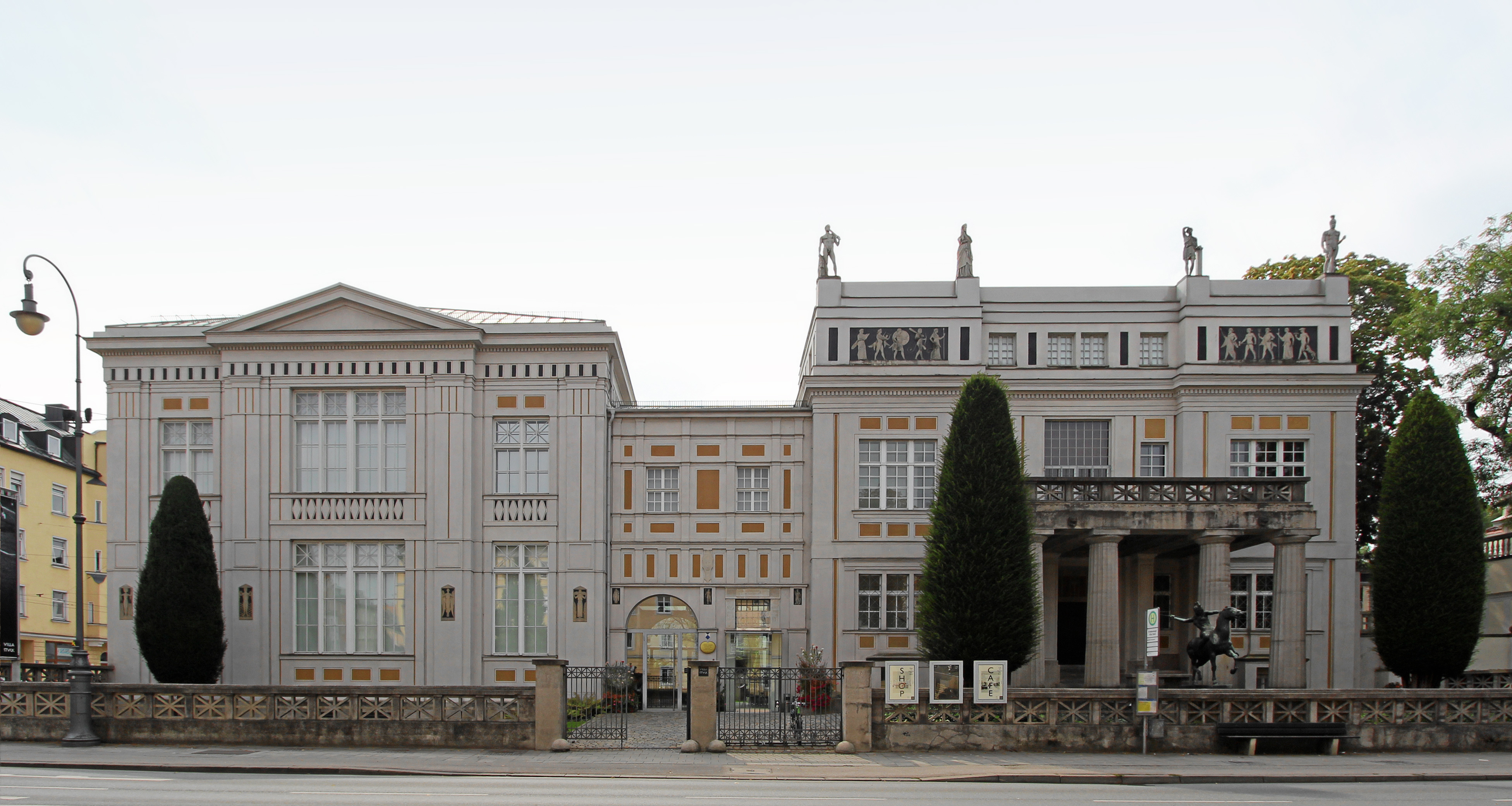 Frontfassade der Villa Stuck 2014